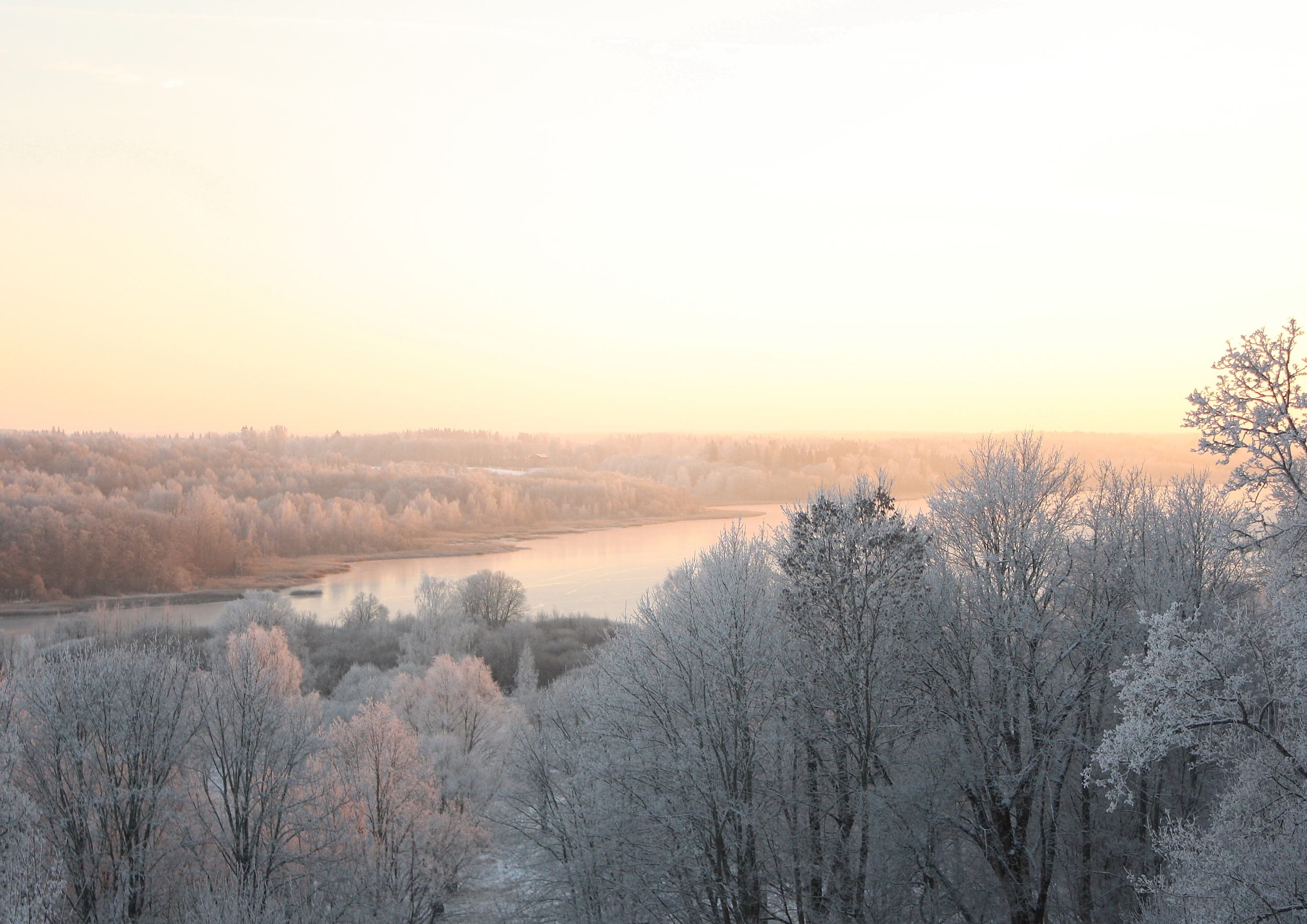 Vaade Viljandi järvele lossimägedest.